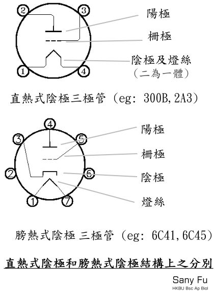 直熱管和膀熱管